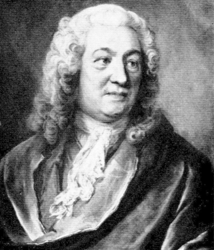 Frans Jennings (1692-1754)